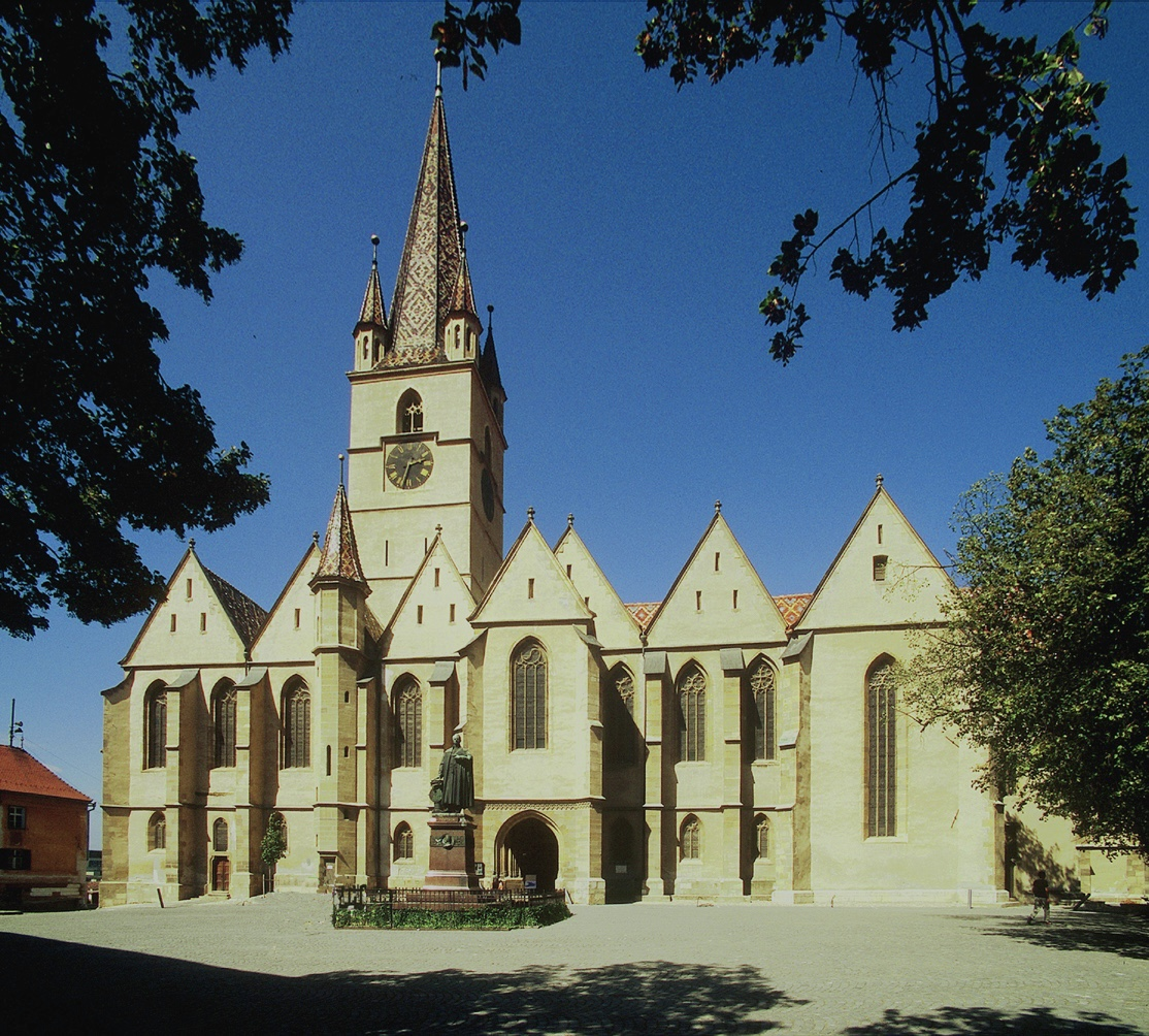 Ev. Stadtpfarrkirche in Hermannstadt (Sibiu), Rumänien – Ansicht von Südwesten mit Bischof-Teutsch-Denkmal.